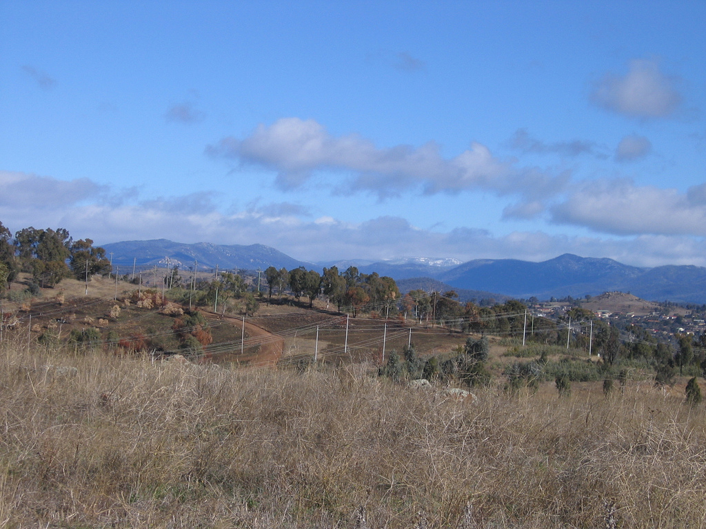 Lesmonts Brindabella enneigés vus de Canberra en Australie